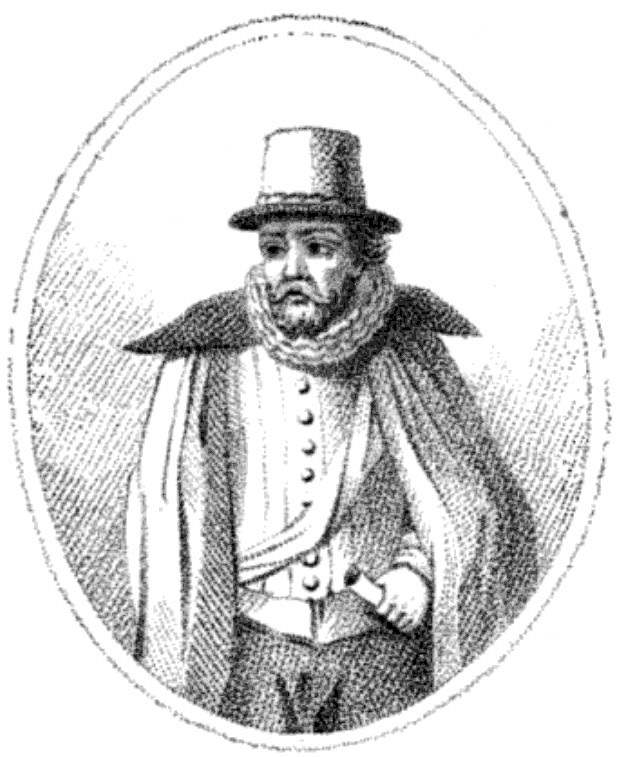 Ambrose Rookwood in wiki